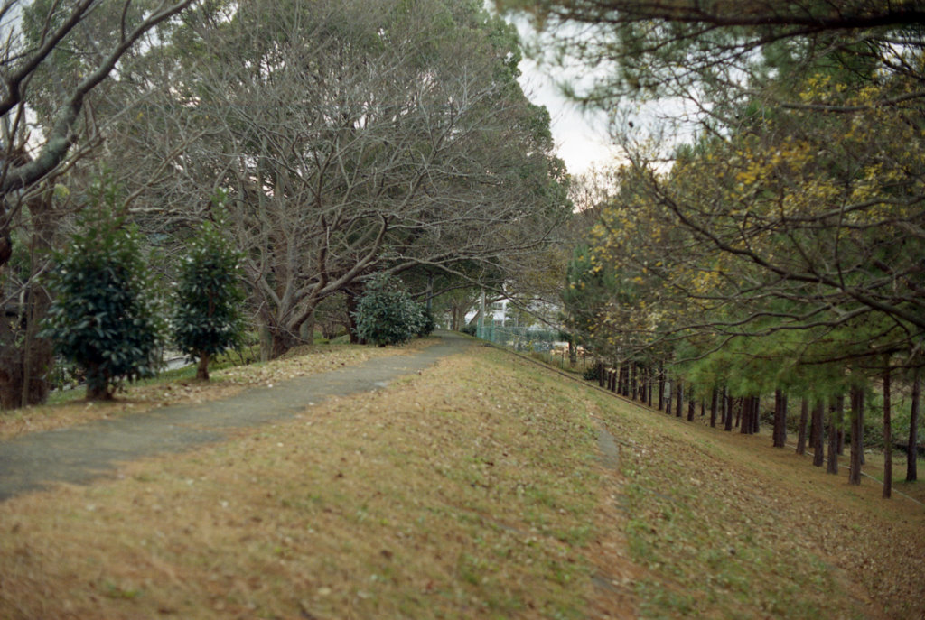 広村堤防